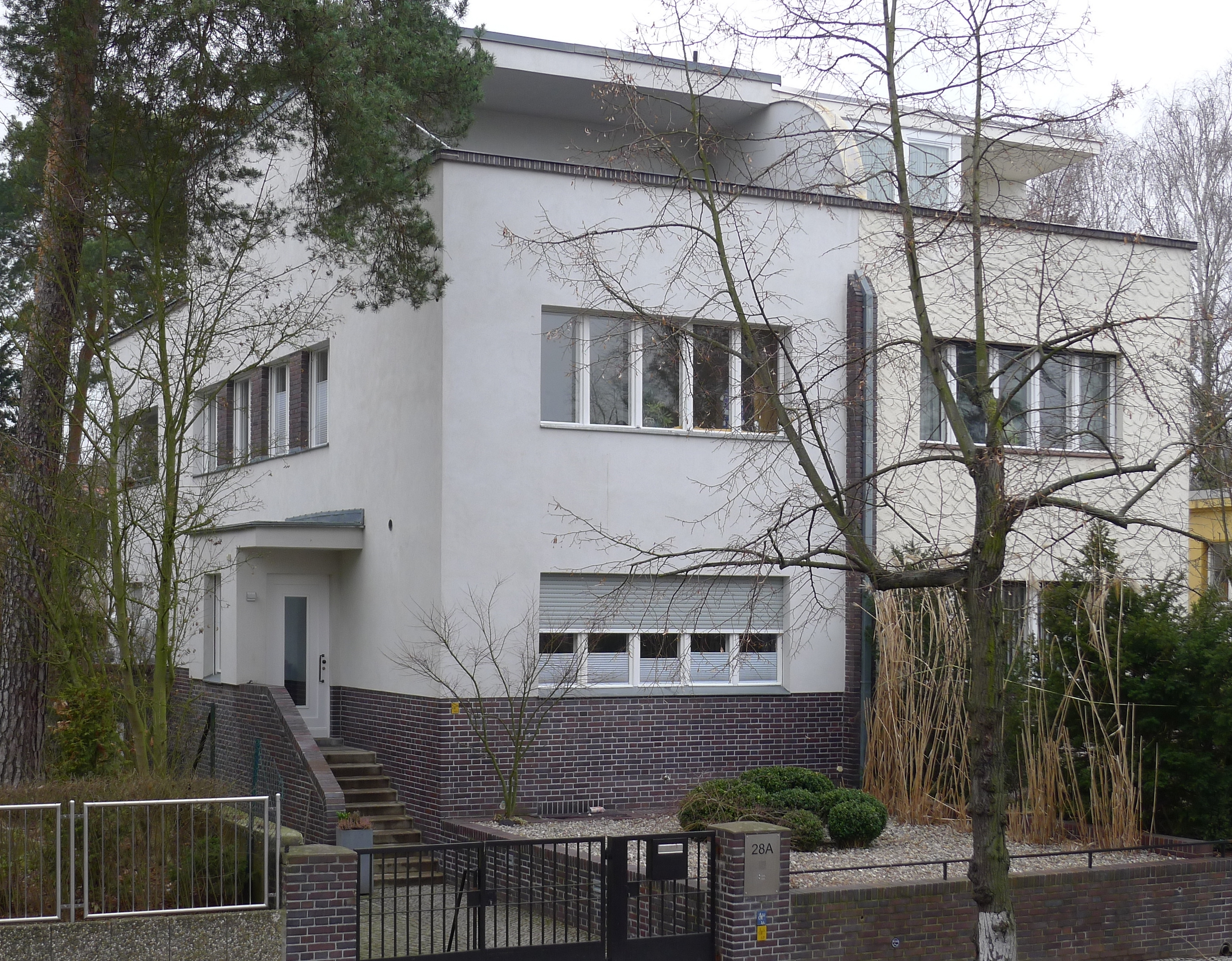 Doppelhaus